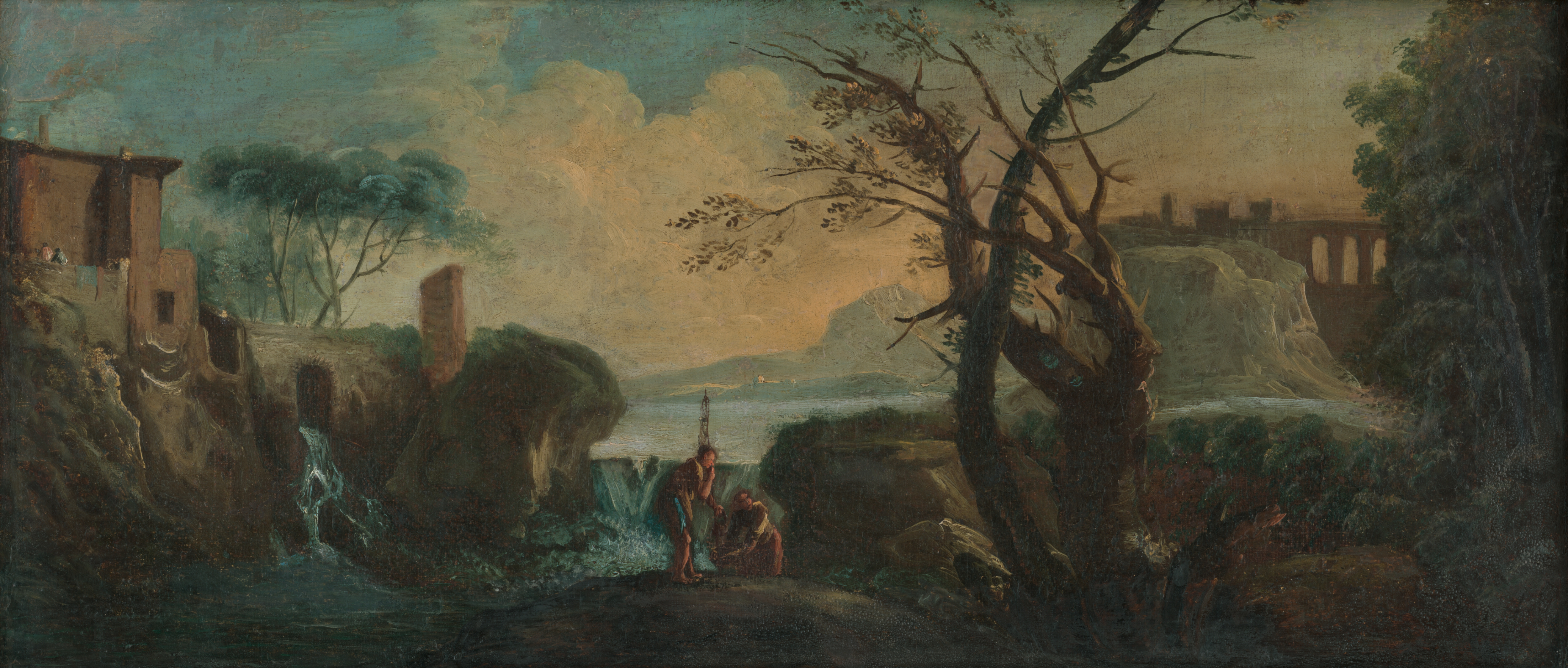 Rybári pri vodopáde